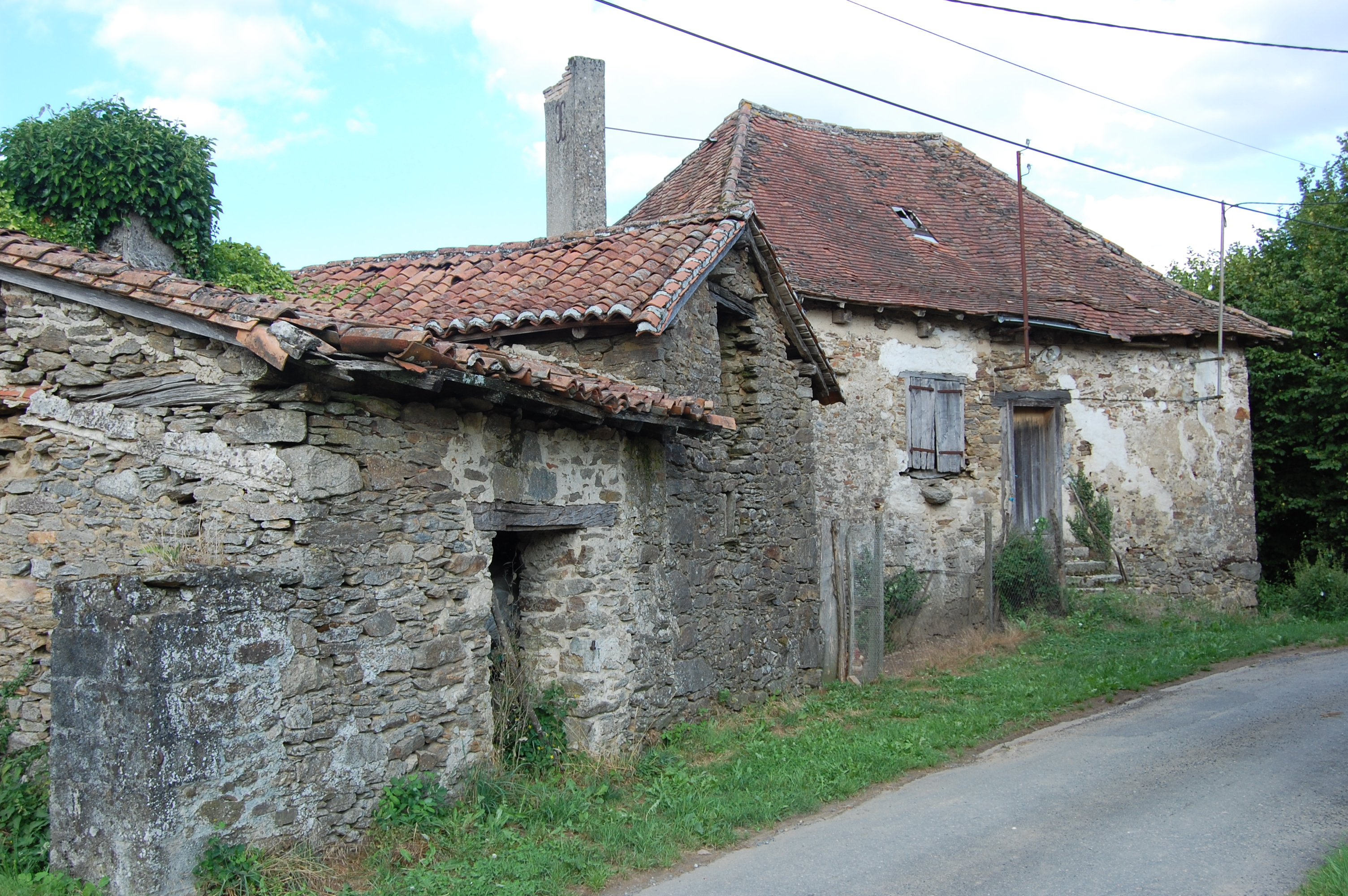 Le Roule, un villages de Châlus ( Haute-Viennne)